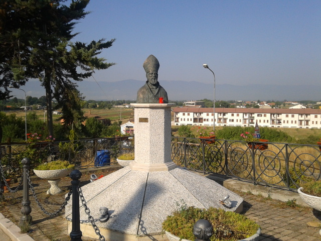 Busto bronzeo di San Berardo dei Marsi a Pescina